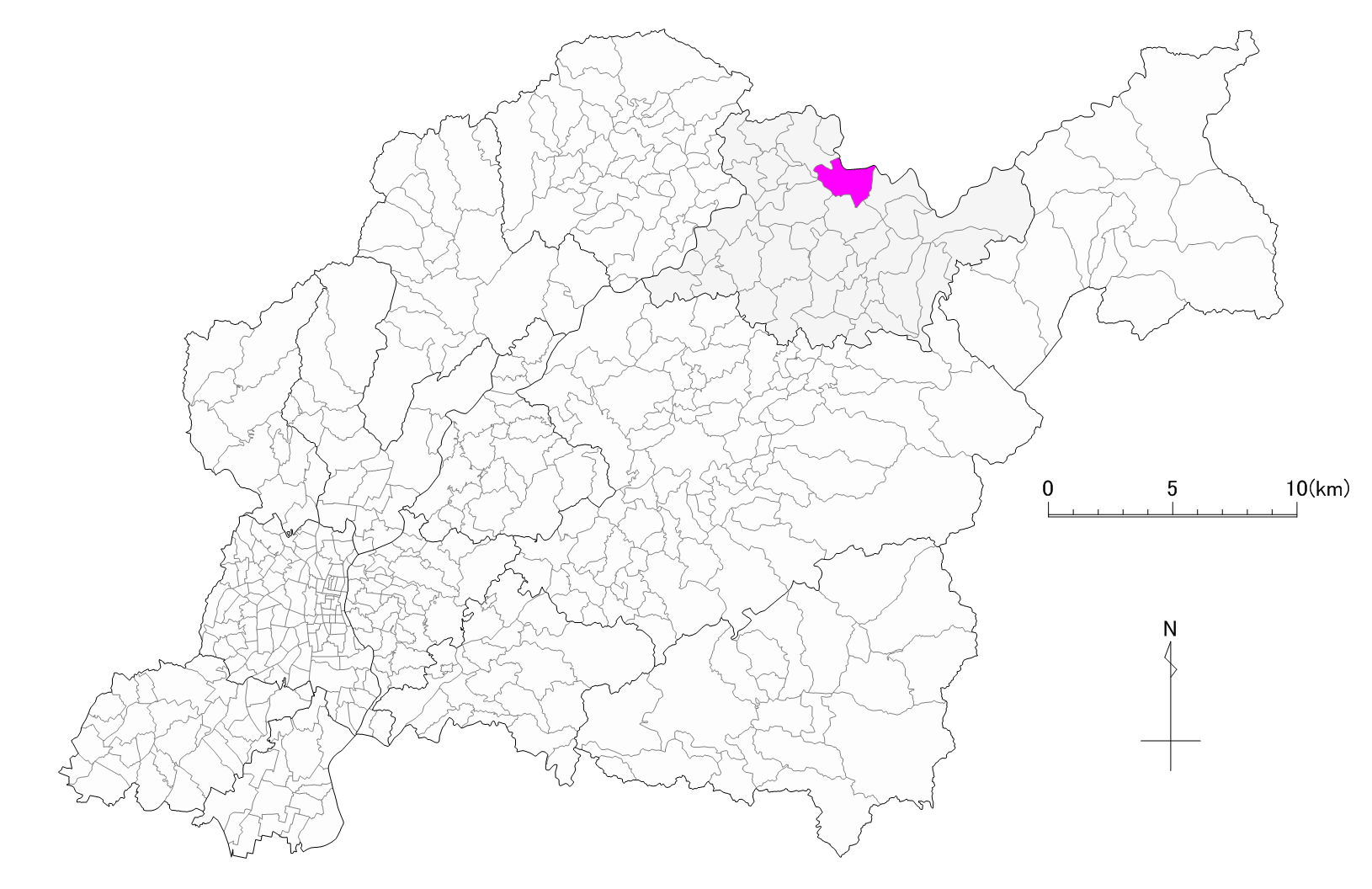 豊田市時瀬町位置図